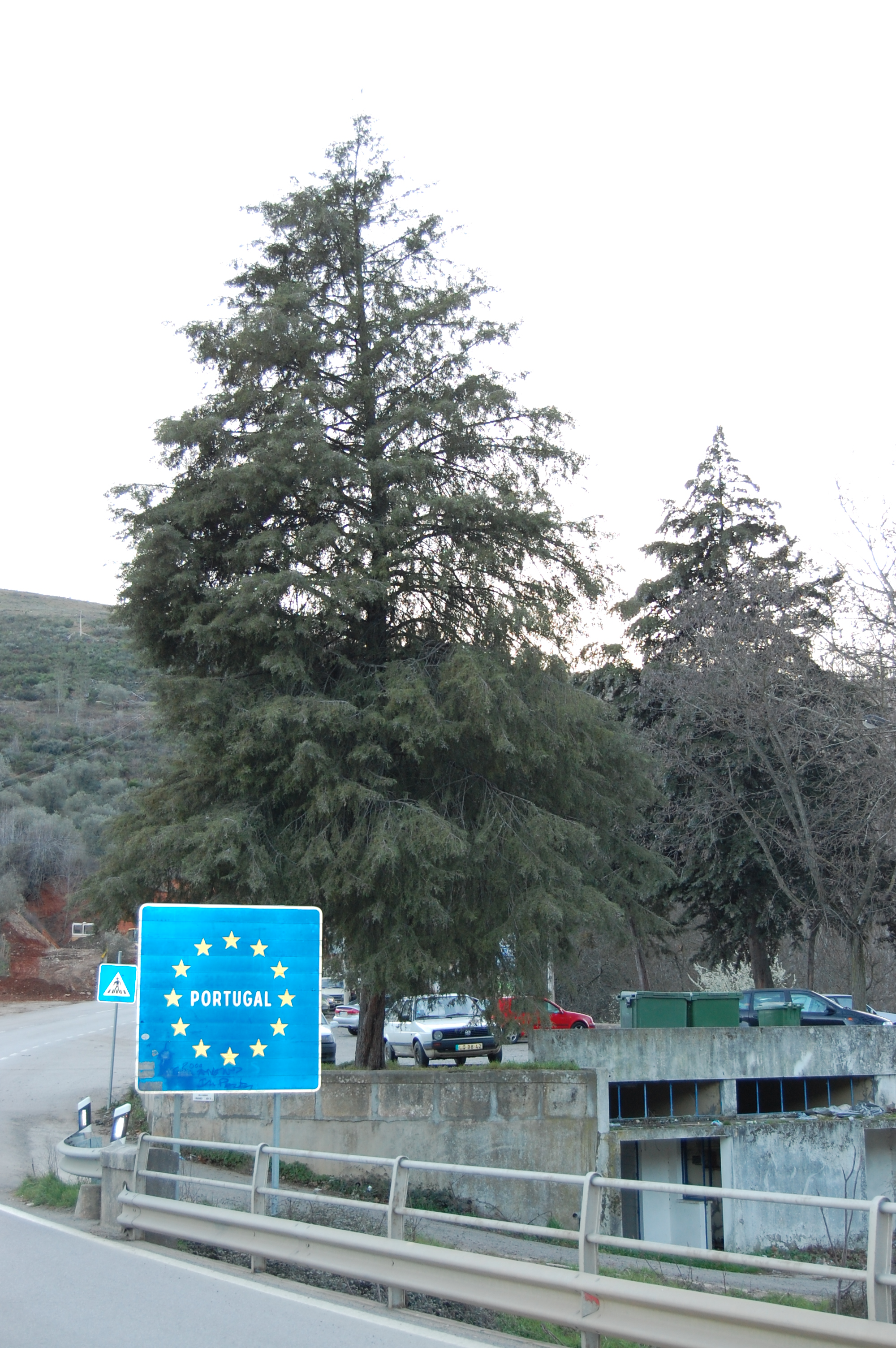 A fronteira entre Portugal (Quintanilha e Espanha (Trabazos.